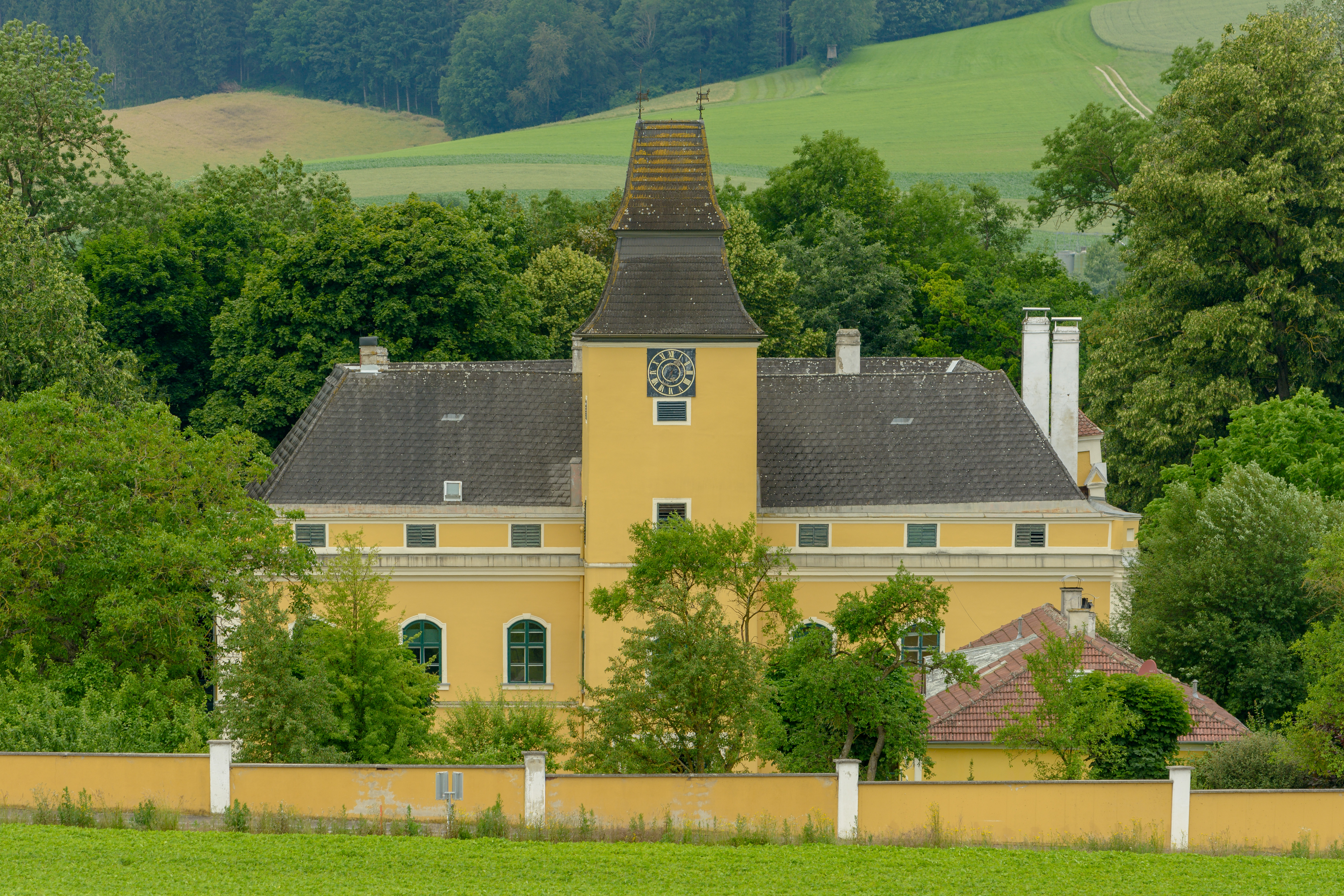 Strannersdorf 'Strannersdorf' (Q66713347)